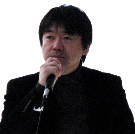 大阪府大東市にて街頭演説中に撮影